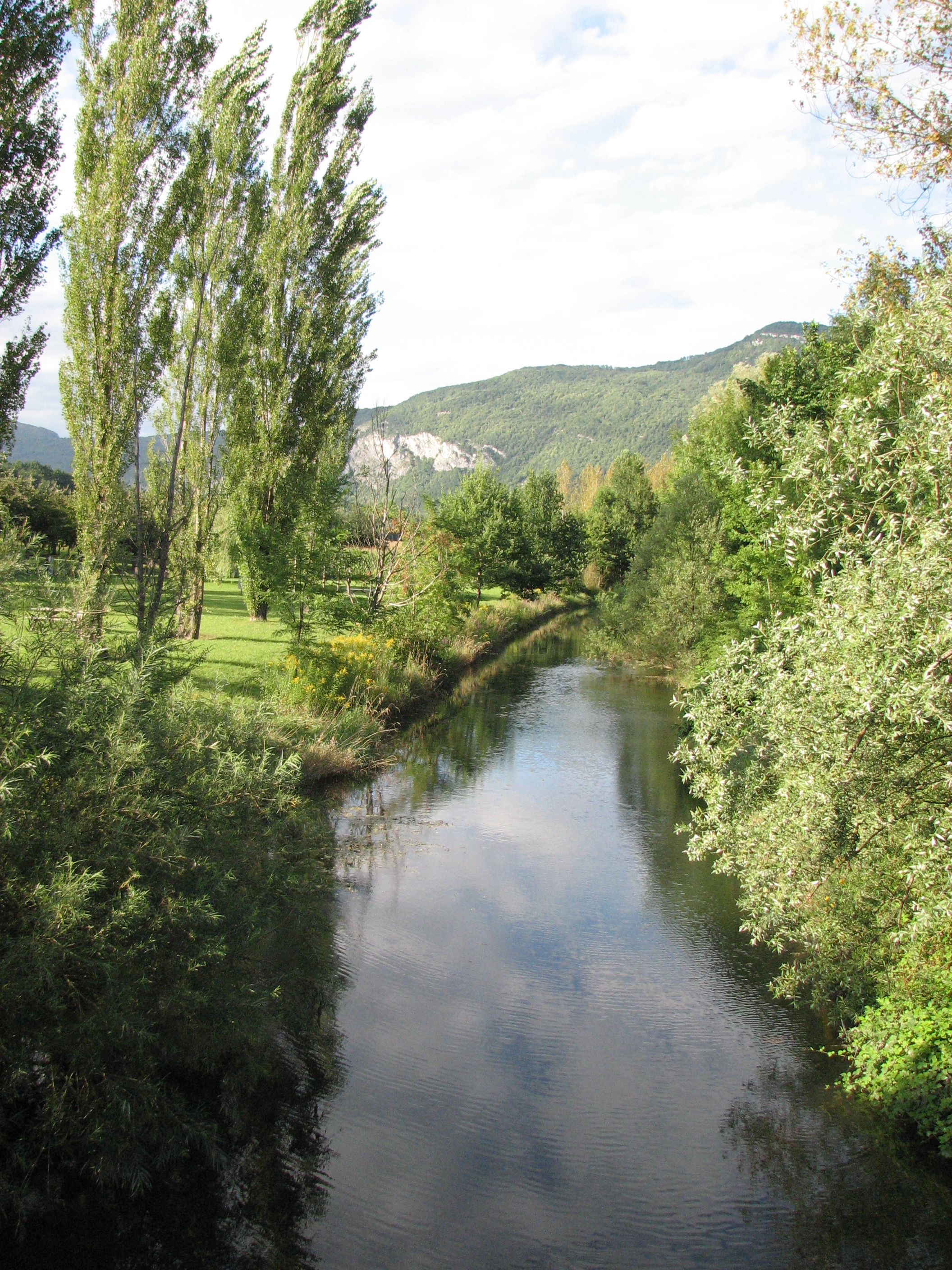 Le Gland (rivière de l'Ain), à son embouchure dans le canal de dérivation de Brégnier-Cordon. À proximité immédiate du pont d'Évieu, sur la commune de Saint-Benoît.